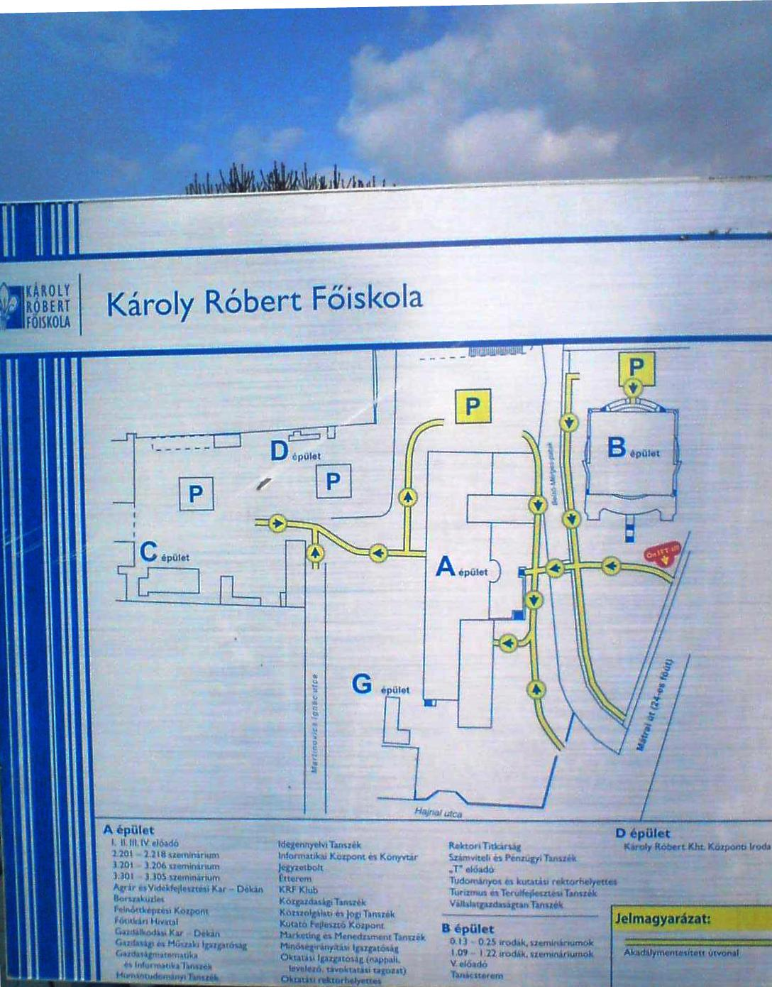 KRF